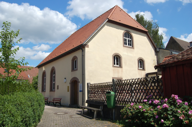 Die Synagoge in Michelbach an der Lücke, Gemeinde Wallhausen, Landkreis Schwäbisch Hall